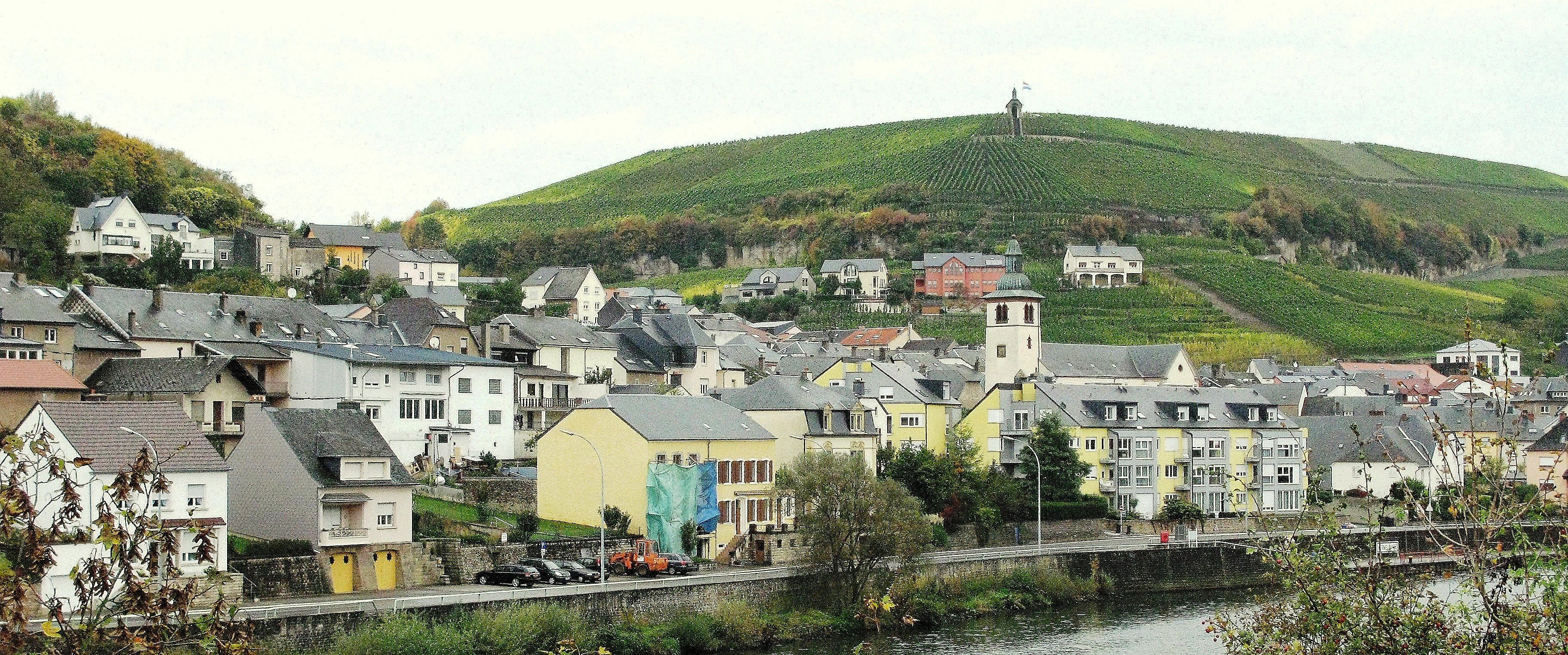 Wurmeldeng mat der Köppchen vun der däitscher Säit aus gesinn